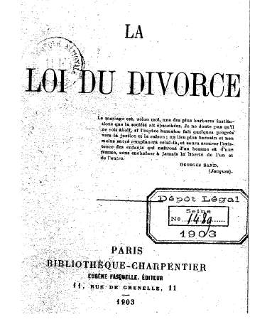 "La Loi du divorce" by French politician Alfred Naquet (1834-1916)